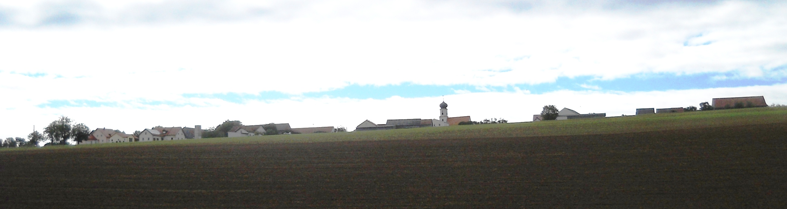 Breitenhill, Gemeindeteil von Altmannstein im oberbayerischen Landkreis Eichstätt